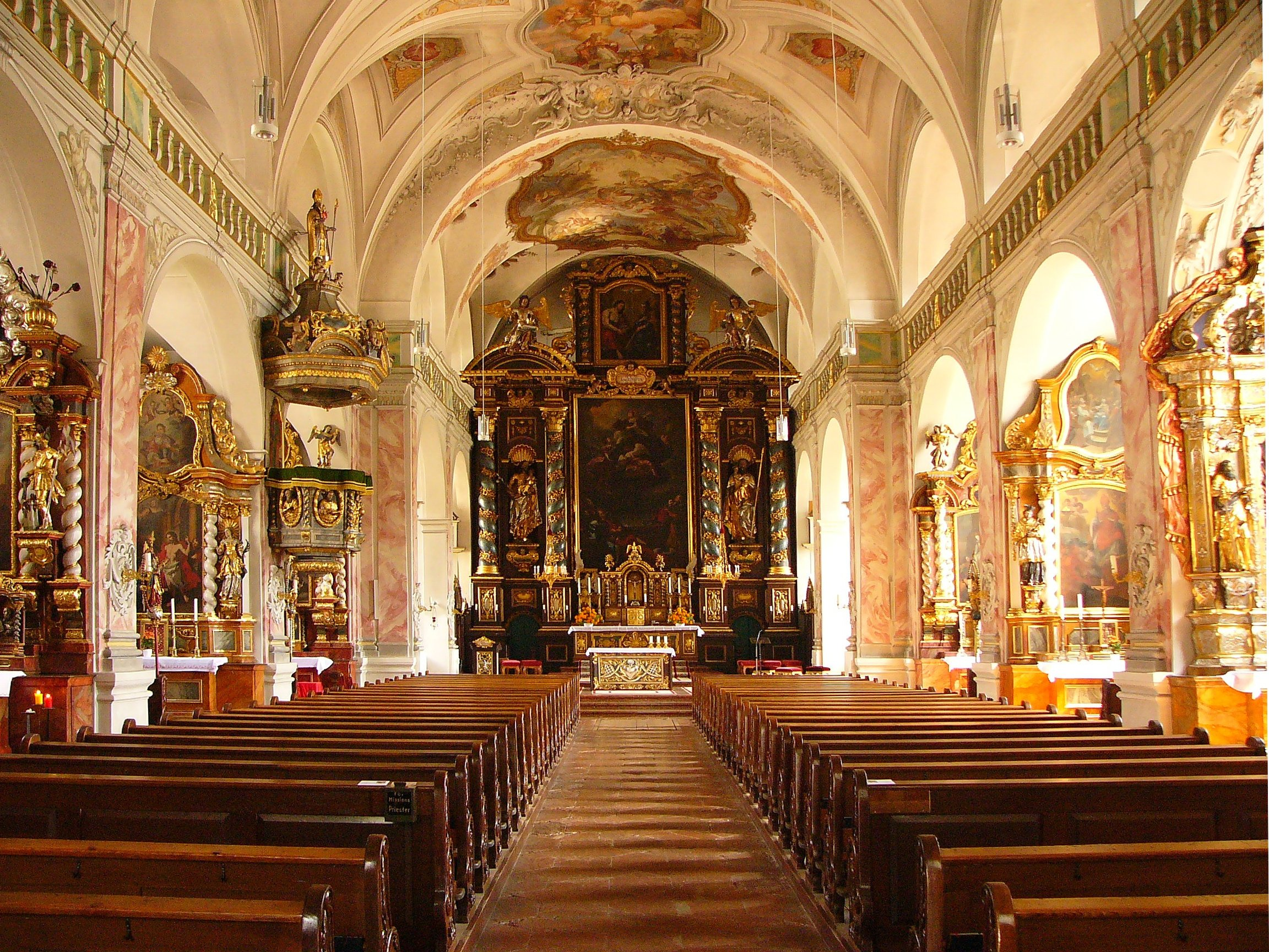 In der Redemptoristen-Klosterkirche Mariä Himmelfahrt in Gars am Inn.This is a photograph of an architectural monument.